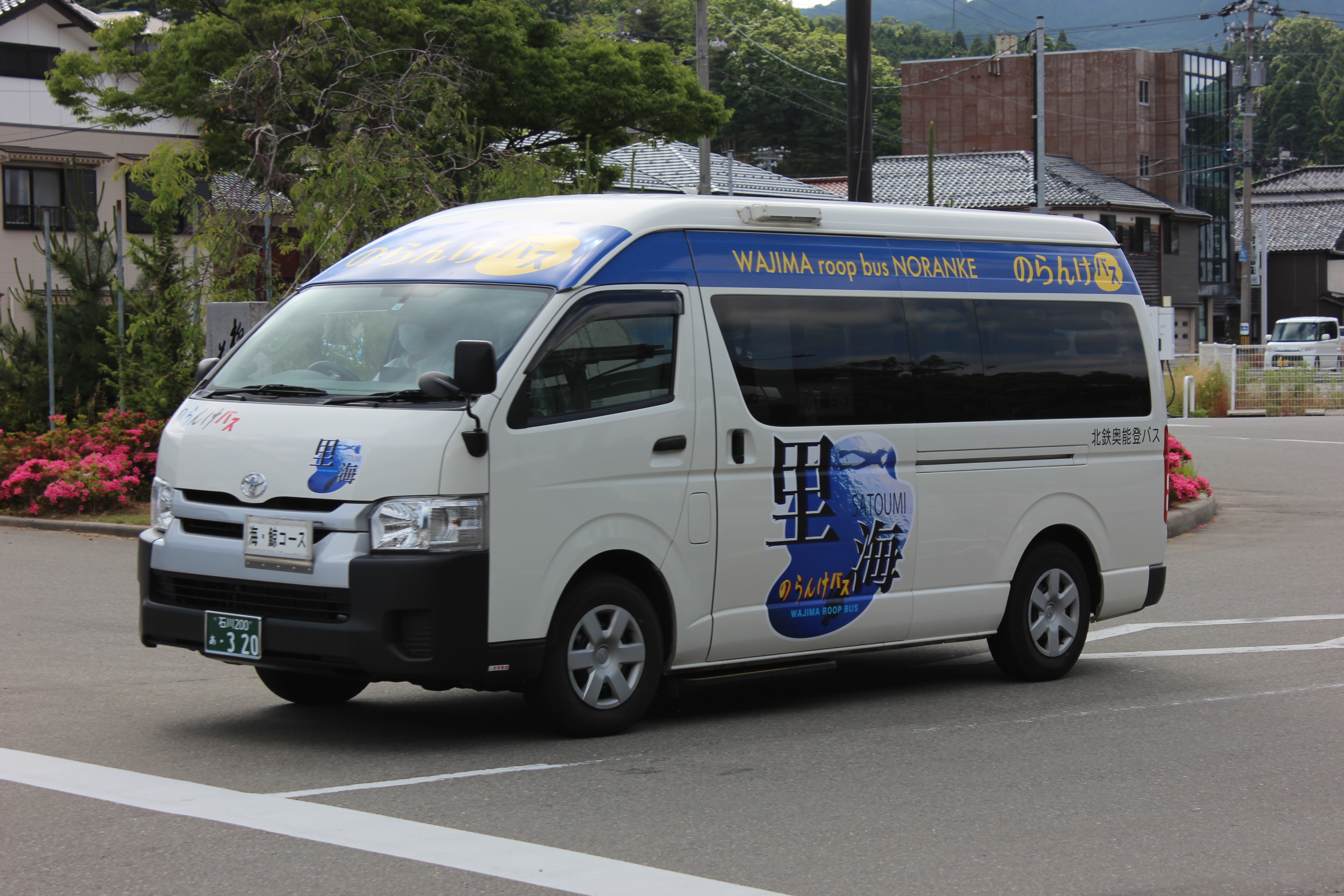 石川県輪島市のコミュニティバス「のらんけバス」（里海デザイン）。 Canon EOS Kiss X5